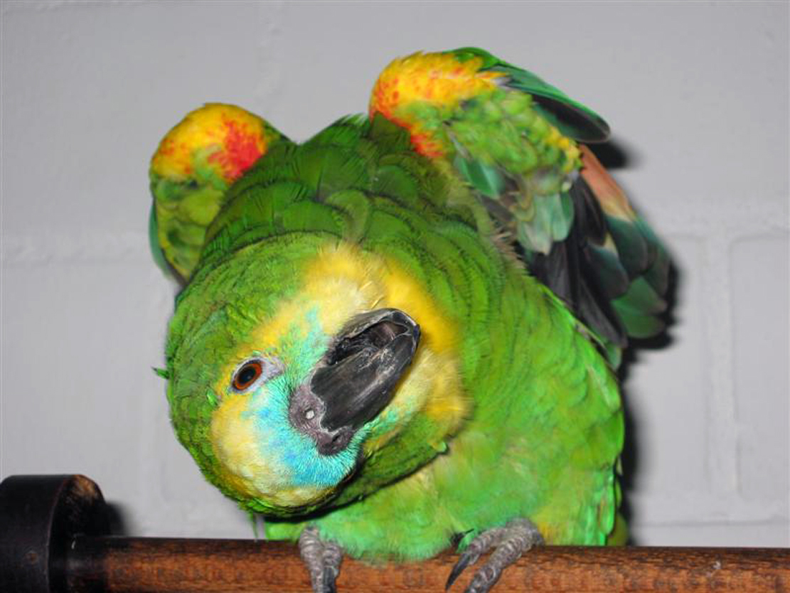 Ausgewachsene Blaustirnamazone (♀, * ∼1972, † 2016)